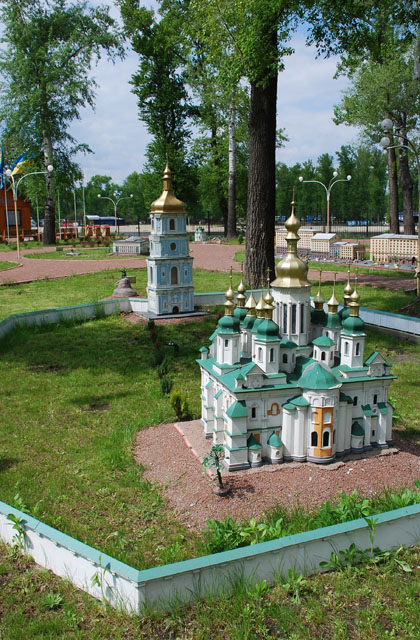 Парк «Киев в миниатюре»